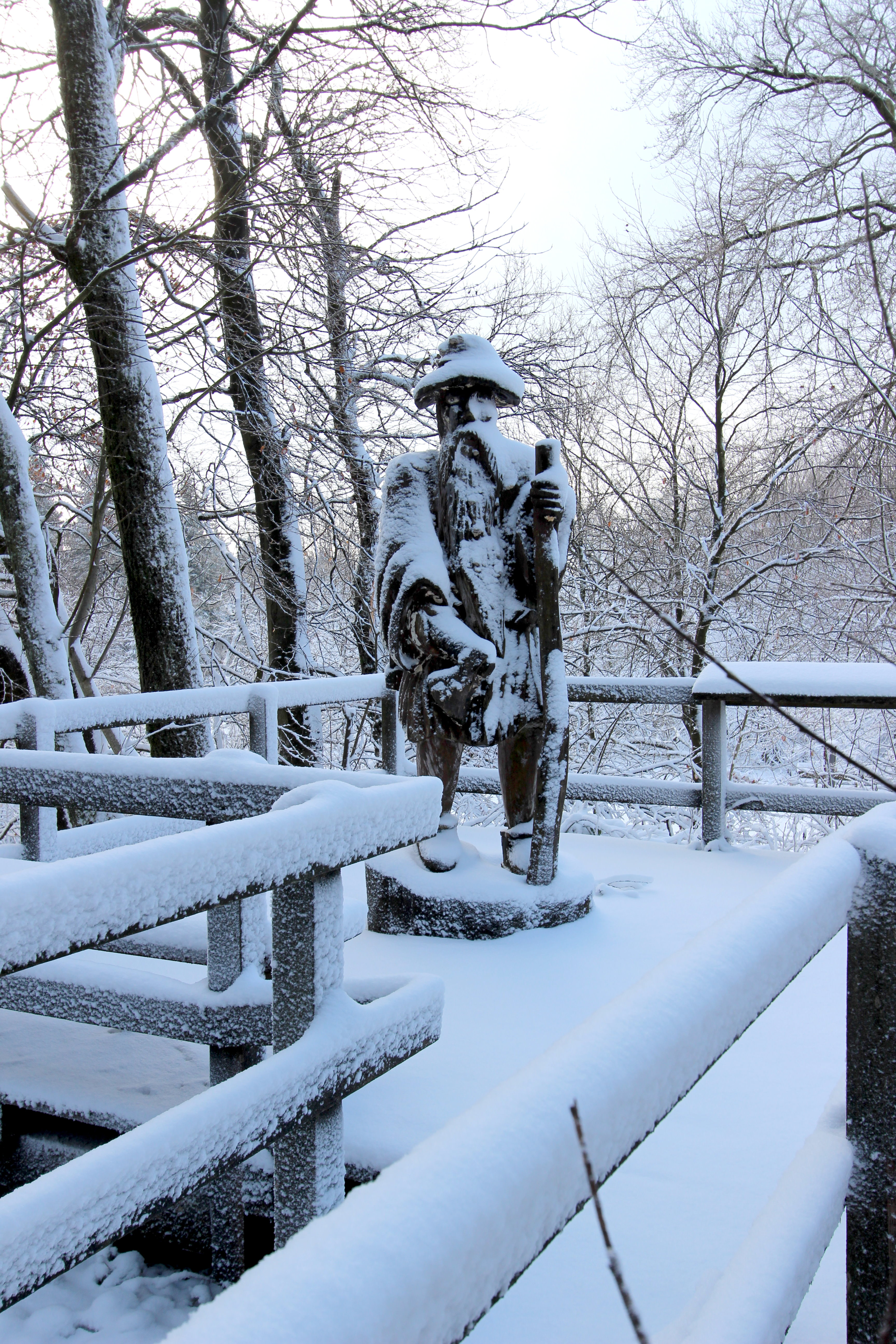 54595 Gondenbrett, Schwarzer Mann 1. Der Schwarze Mann bei Buchet-Halenfeld im rheinland-pfälzischen Eifelkreis Bitburg-Prüm ist mit 697,8 m ü. NHN nach einem nahen Gipfel mit 699,1 m Höhe die zweithöchste Erhebung der Schneifel. In Gipfelnähe befindet sich der Sender Schnee-Eifel. Die Umgebung ist ein gut erschlossenes Wandergebiet und das größte Wintersportgebiet in Rheinland-Pfalz. Aufnahme von 2017.